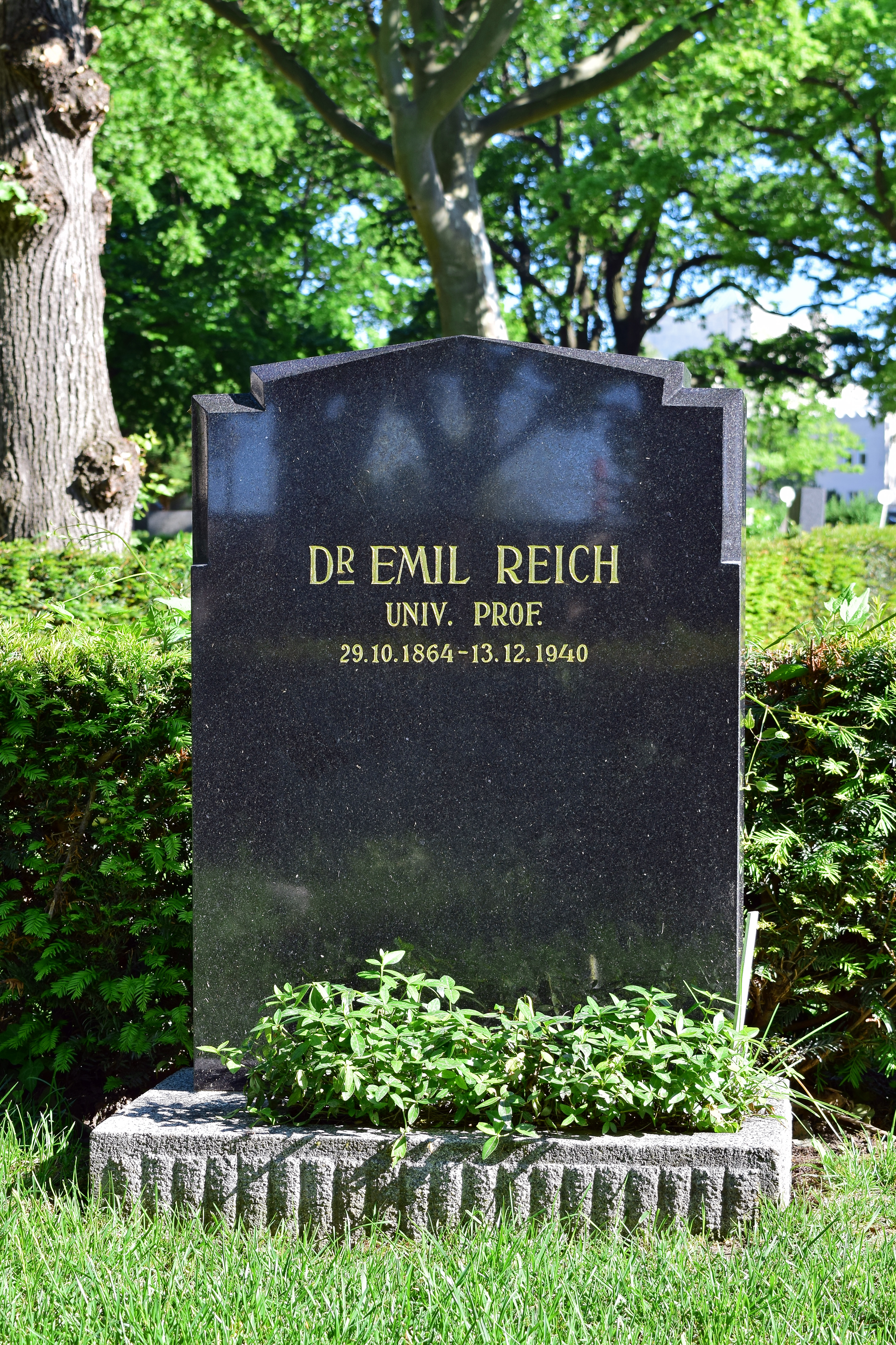 Ehrenhalber gewidmetes Grab von Emil Reich auf dem Urnenhain der Feuerhalle Simmering, Gruppe 2, Abt. 6, Ring 2, Nr. 31